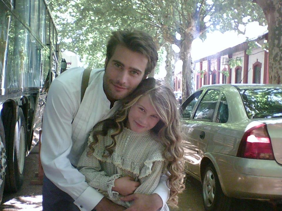 Belen Leiva e l'attore Rodrigo Guirao Diaz in Terra Ribelle